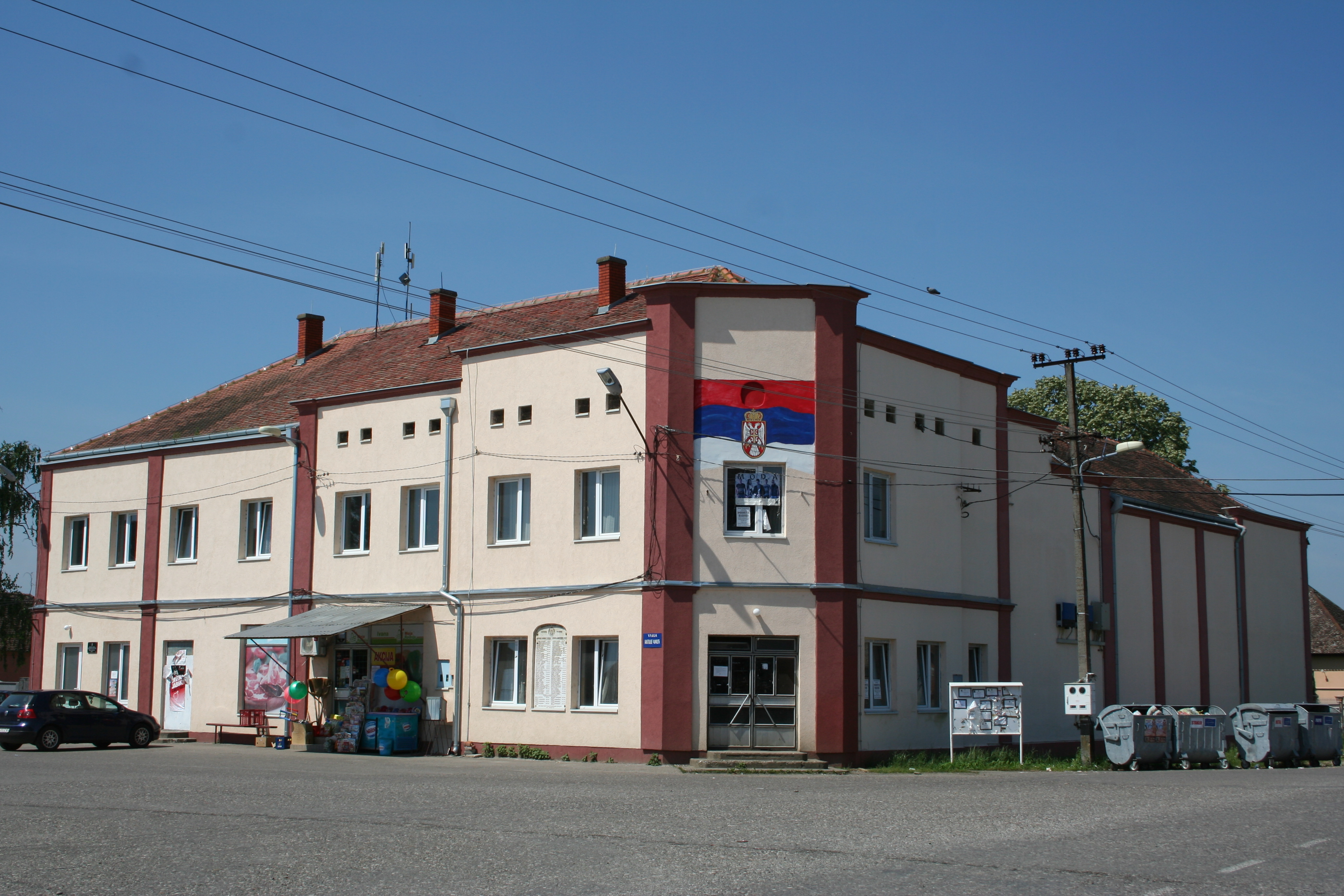 Dom kulture, Dublje